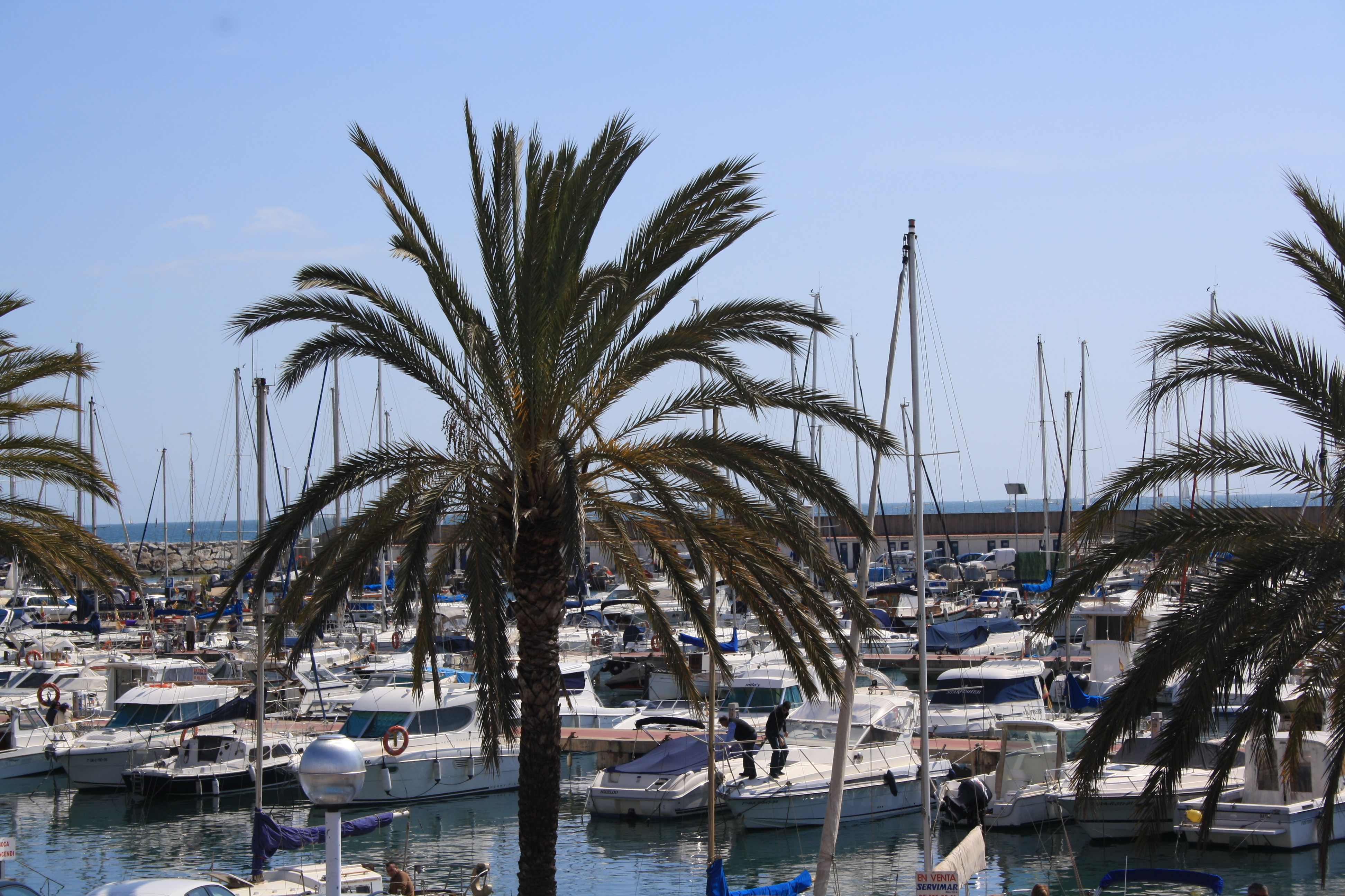 El Masnou, 20 de març de 2011